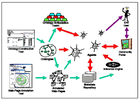 Utilisation des métadonnées dans le Web sémantique (Gueraich, 2012)